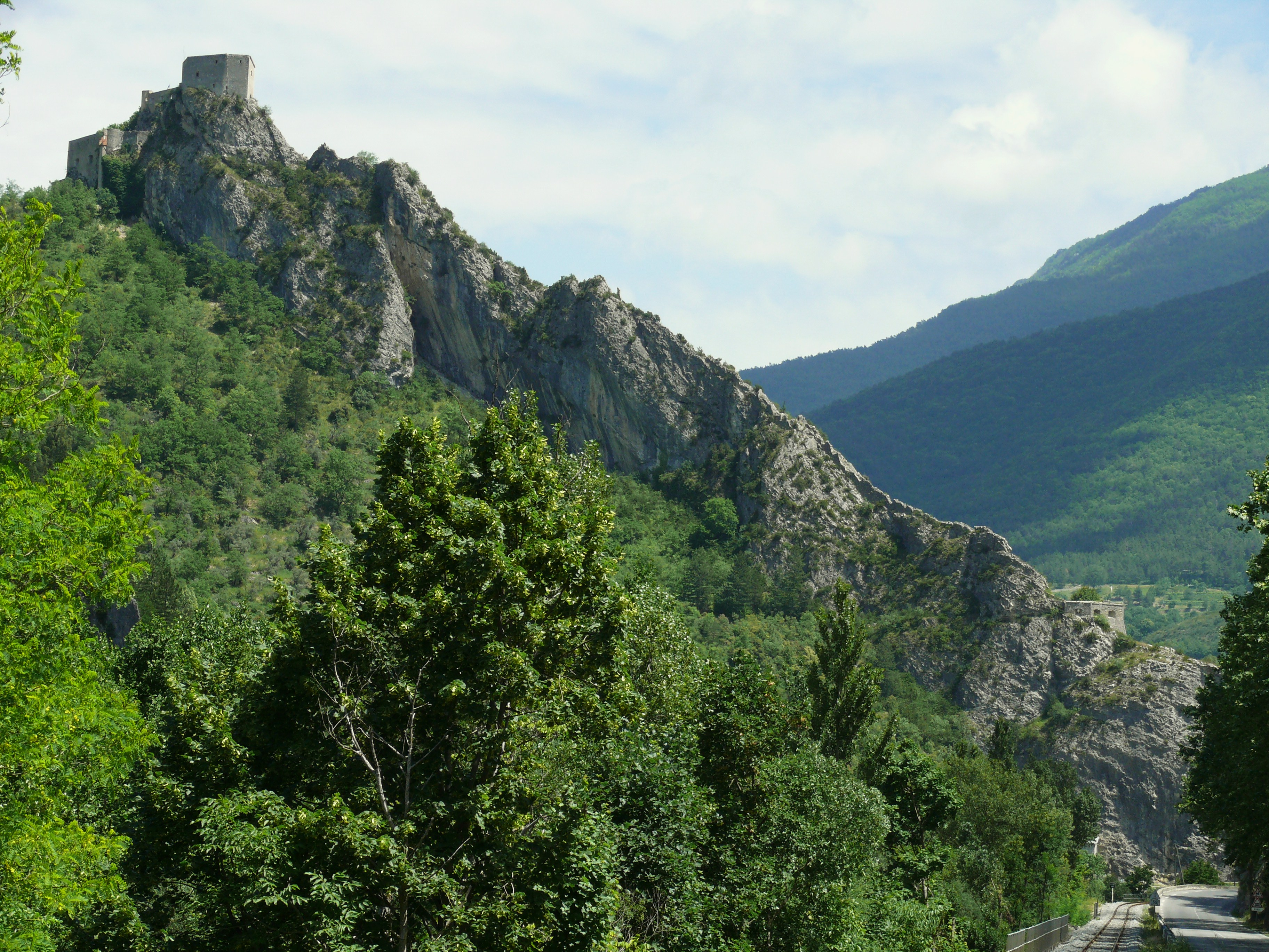 Entrevaux - La barre rocheuse avec la citadelle